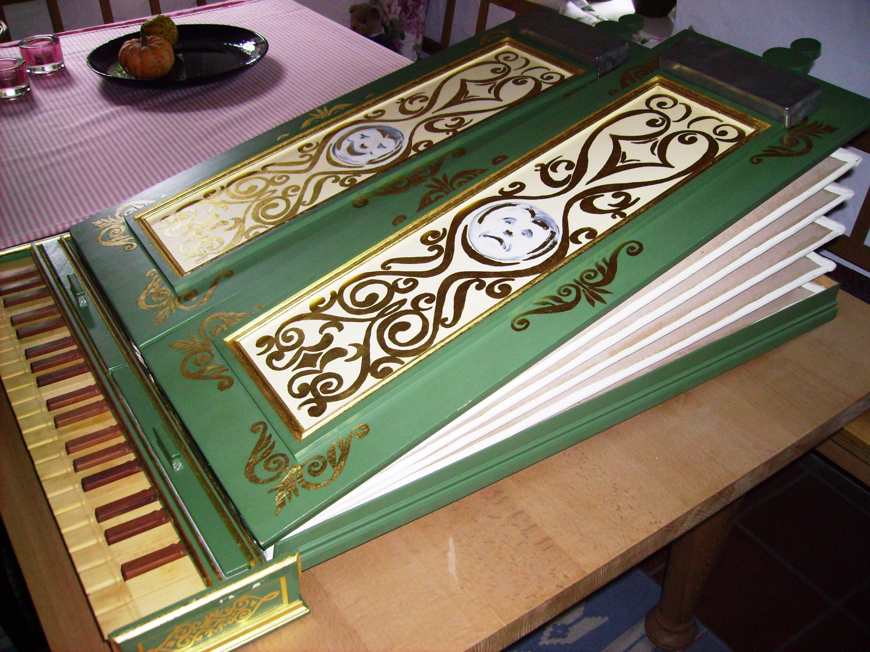 Bibelregal nach Klotz; Kopie eines Originals aus dem Germanischen Nationalmuseum in Nürnberg, Original um 1600, Kopie von 1988